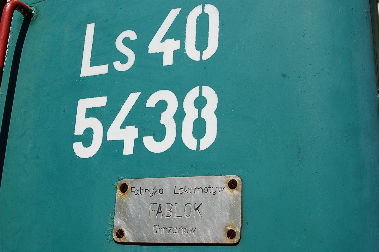 Ls40-5438 locomotive in Skansen Parowozownia Kościerzyna